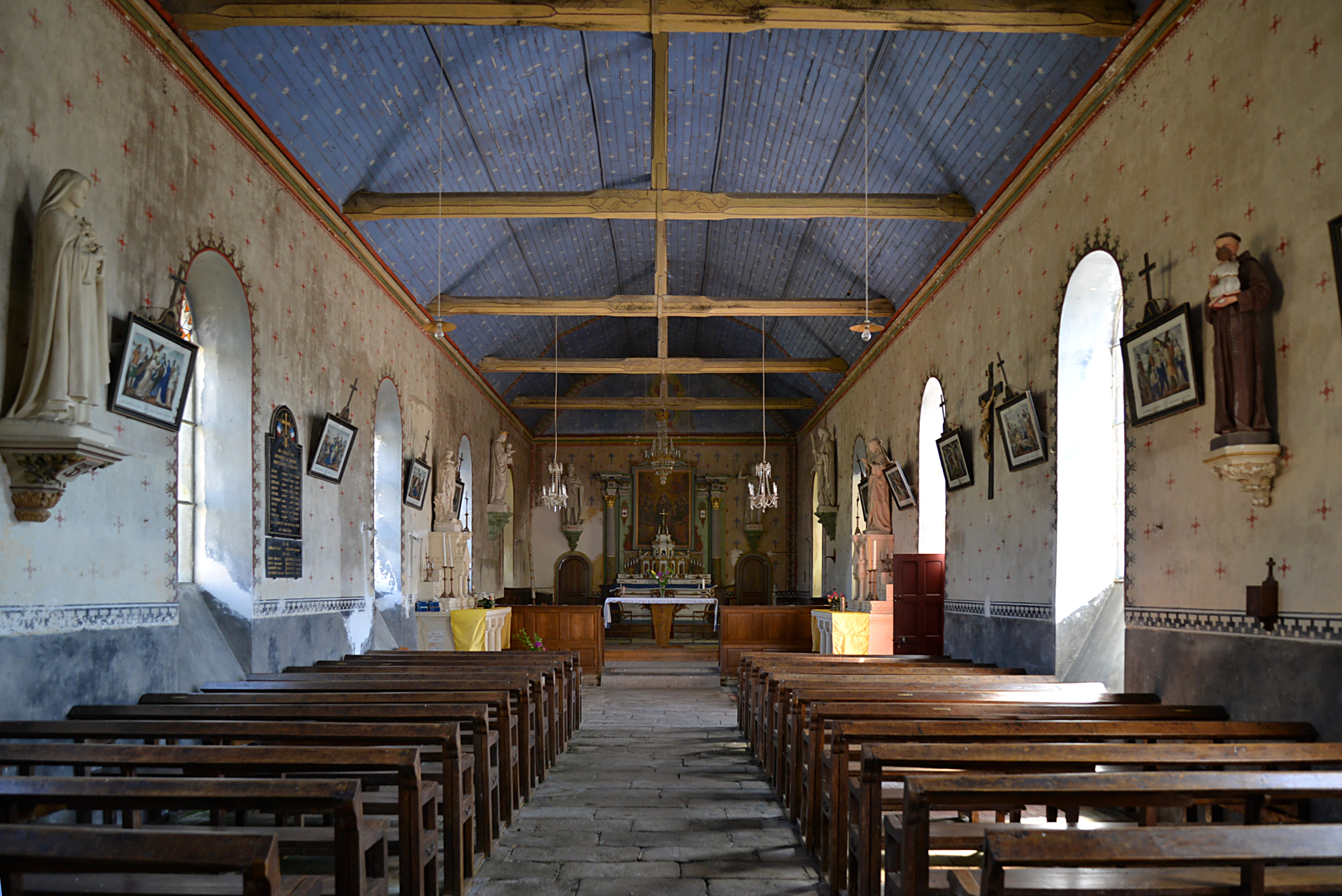 Montreuil-au-Houlme (Orne)